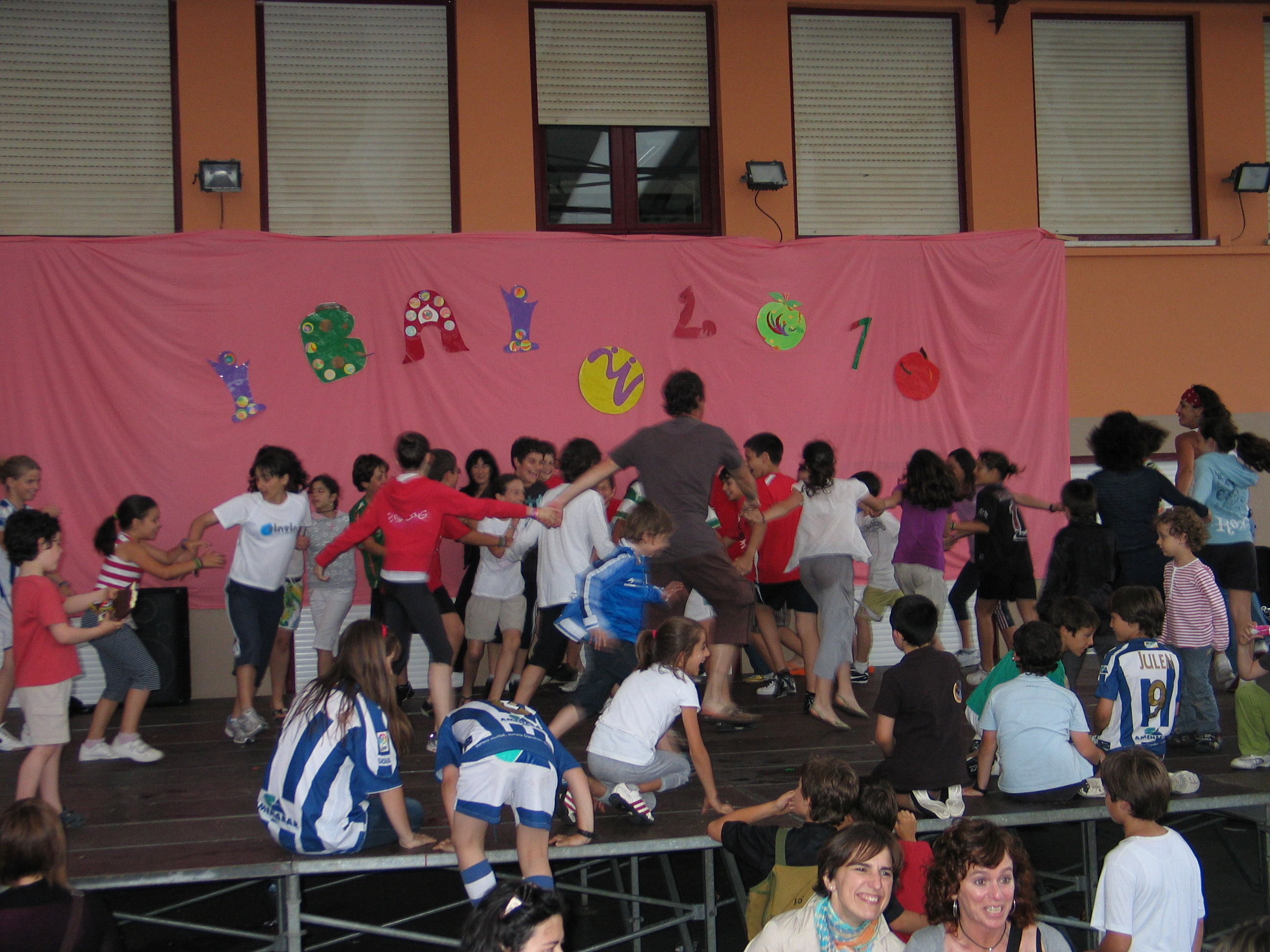 2010ko kurtso amaierako festa.